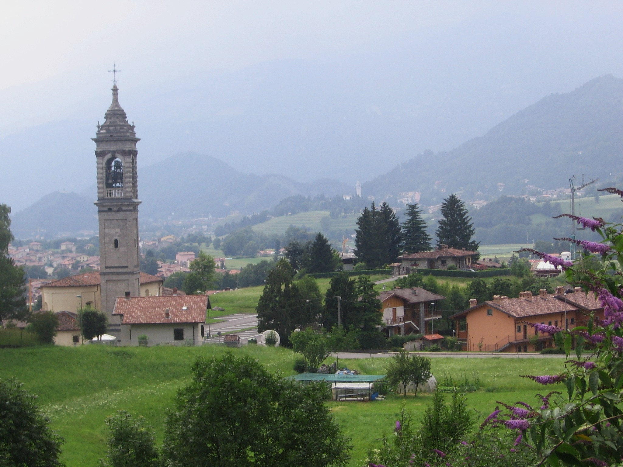 Songavazzo, Bergamo, Italy